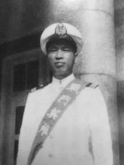 梁天价(時任中華民國海軍雅龍軍艦上尉艦長)